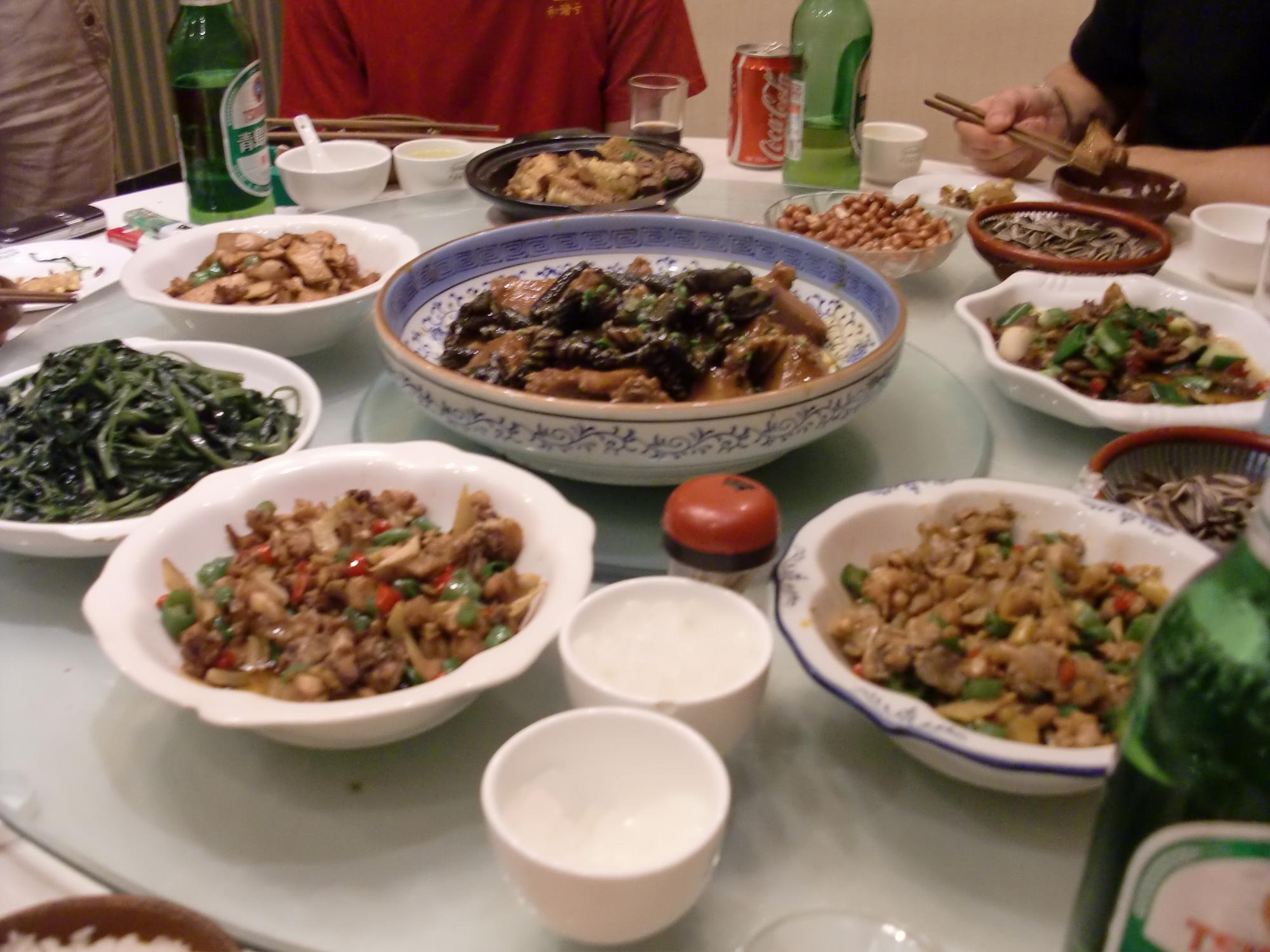 Schlange essen in Peking